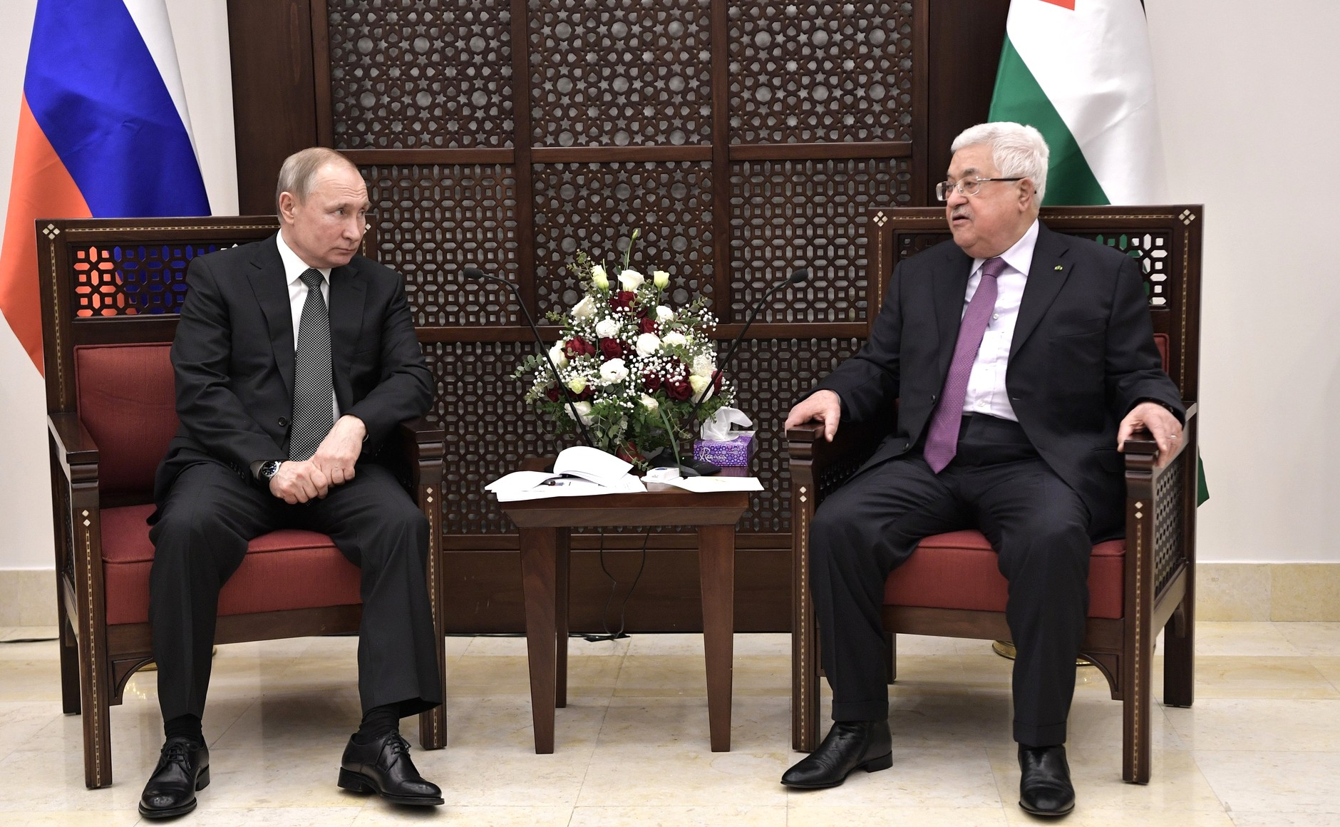 Президент России Владимир Путин с Президентом Палестины Махмудом Аббасом.